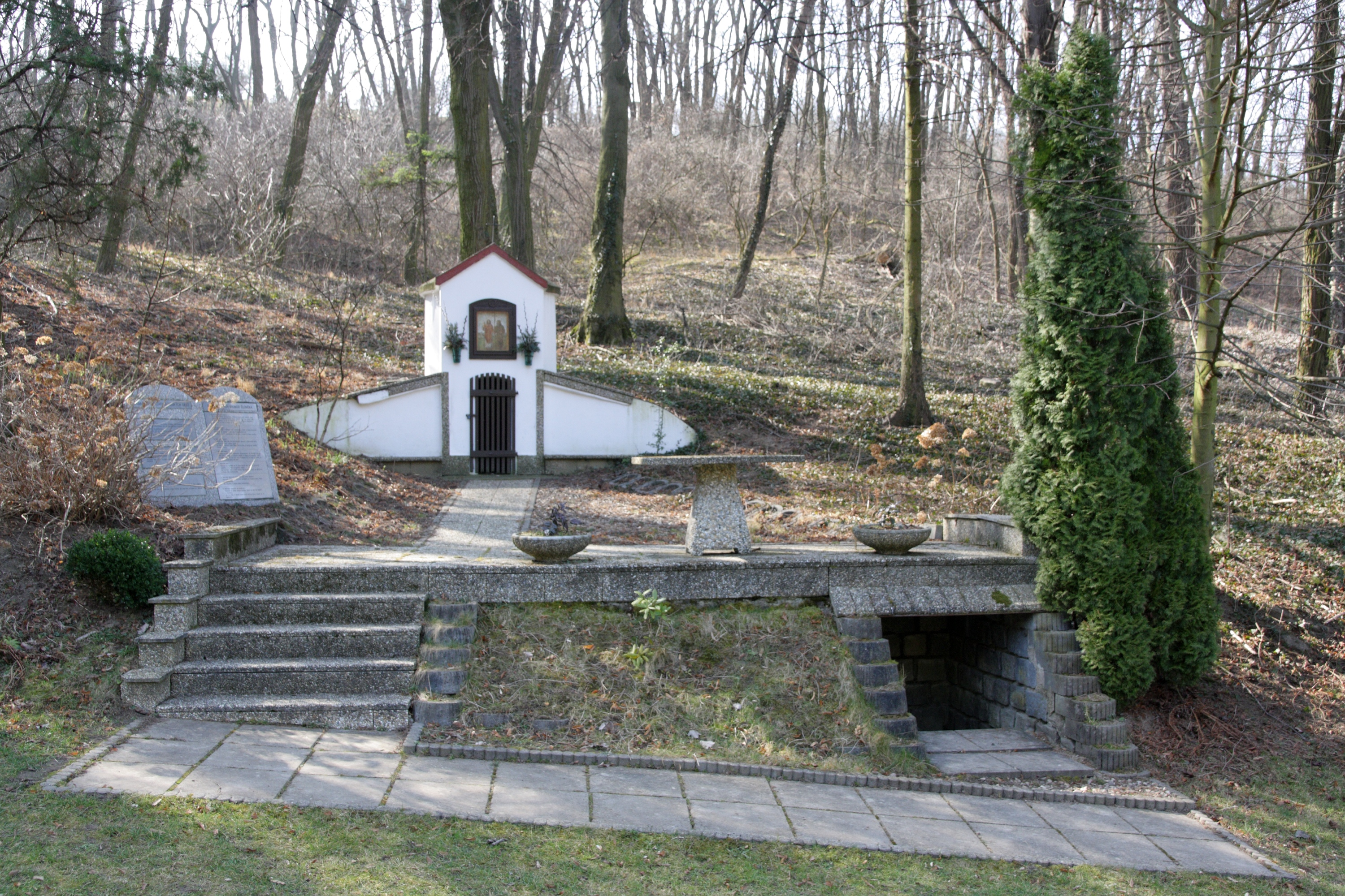 Křepice - U Svaté.